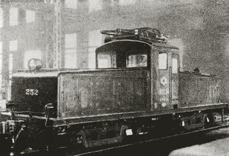 関西電力モ250形電気機関車モ252号機。製造元の日立製作所にて落成時に撮影された形式写真。